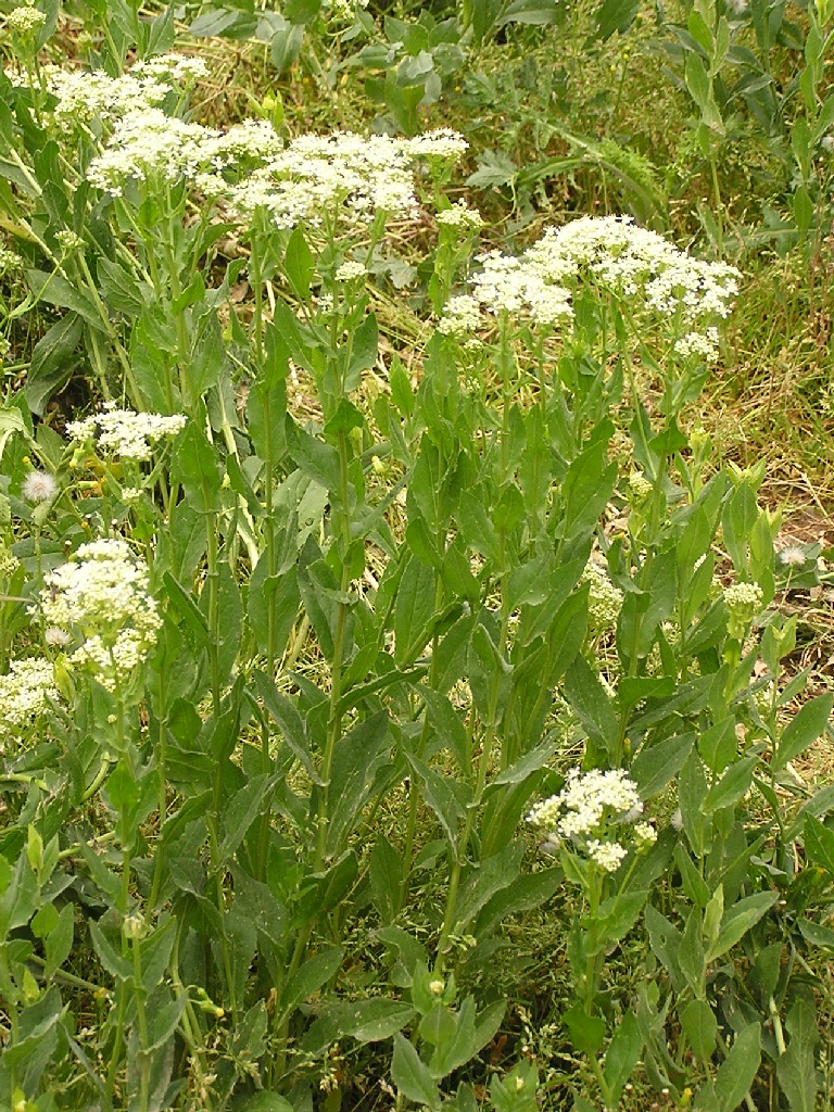 Cardaria draba auf einem Weinberg im Ahrtal (Deutschland).